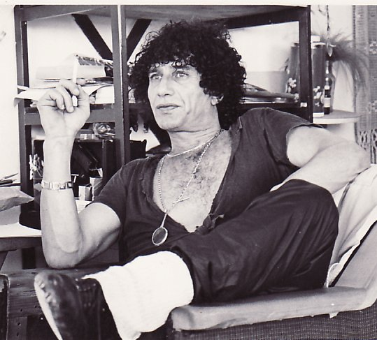 משה אפרתי